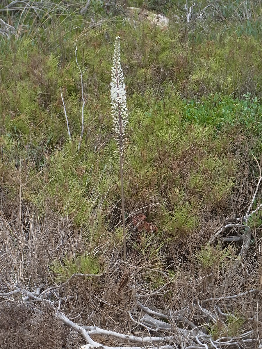 Meerzwiebel (Drimia maritima), bei Sant Tomás (Menorca)